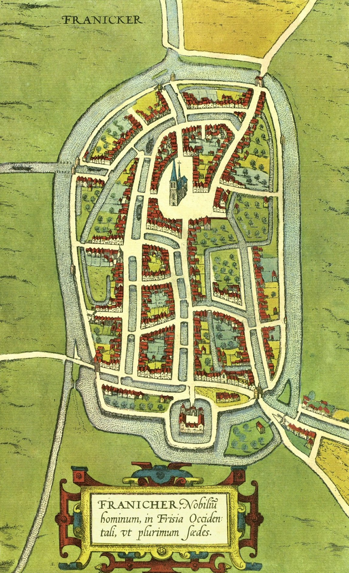 Braun & Hogenberg - Frjentsjer